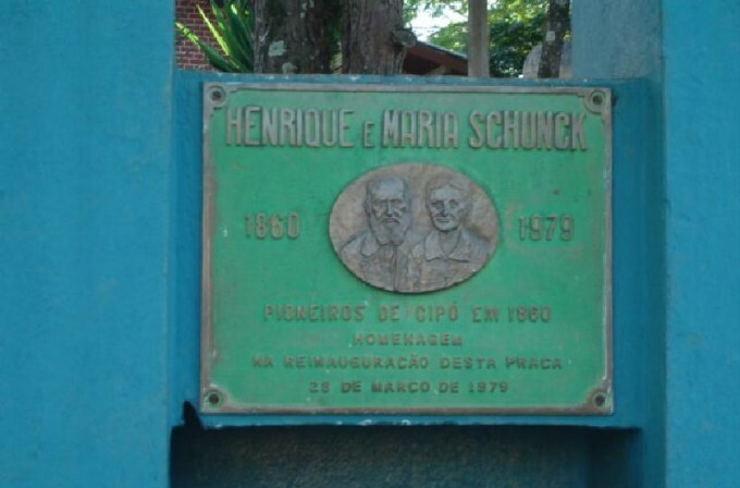 Homenagem á Henrique Schunck na praça de mesmo nome em Cipó-Guaçu